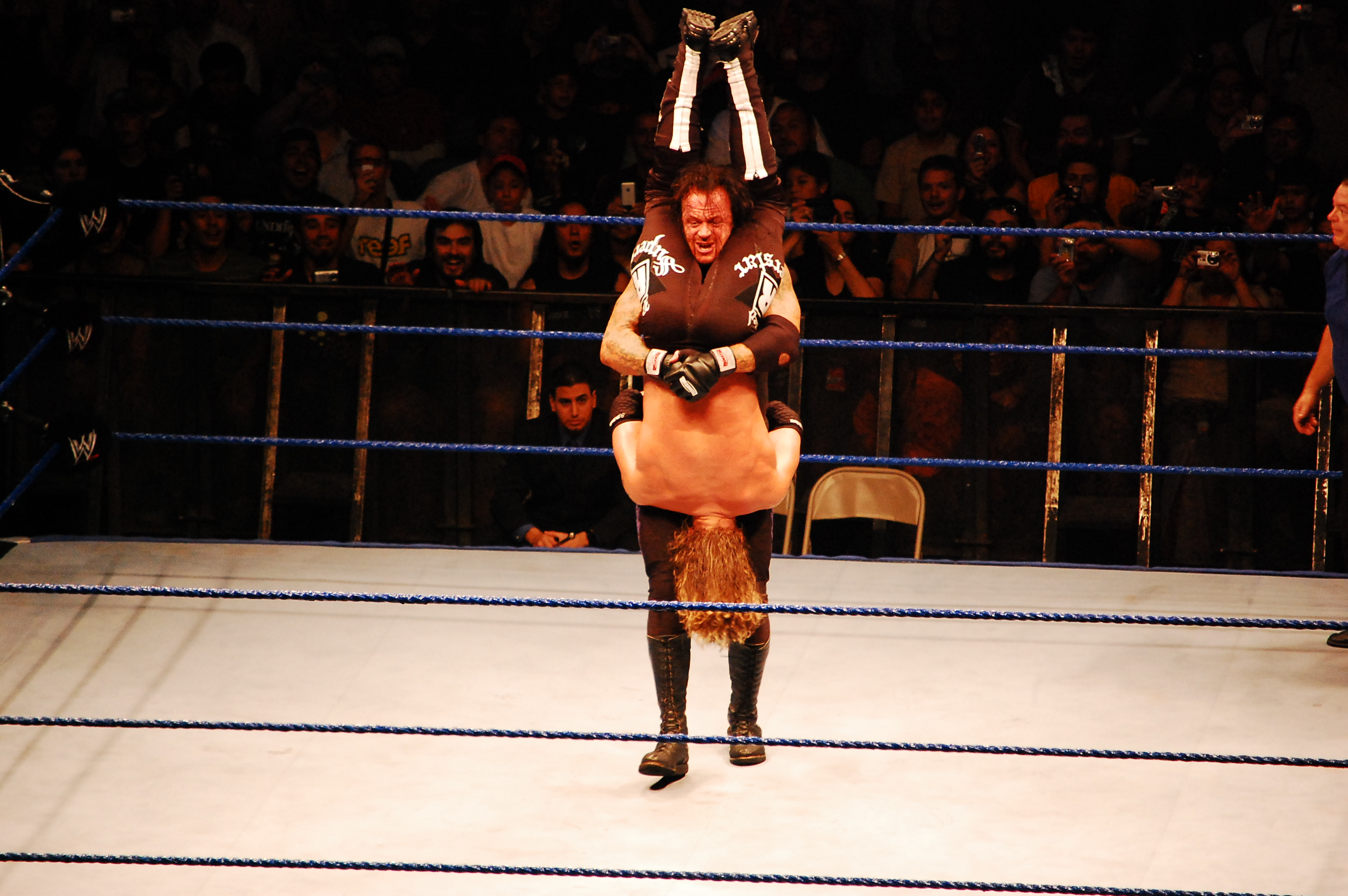 notable undertaker frente a edge